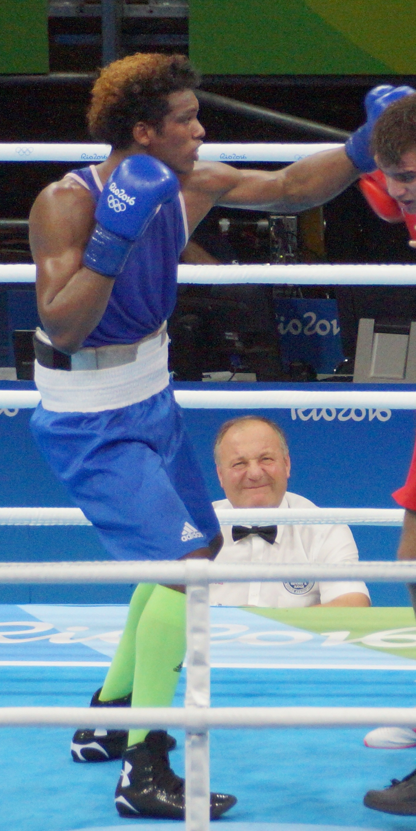 Carlos Andrés Mina, Rio Olympics